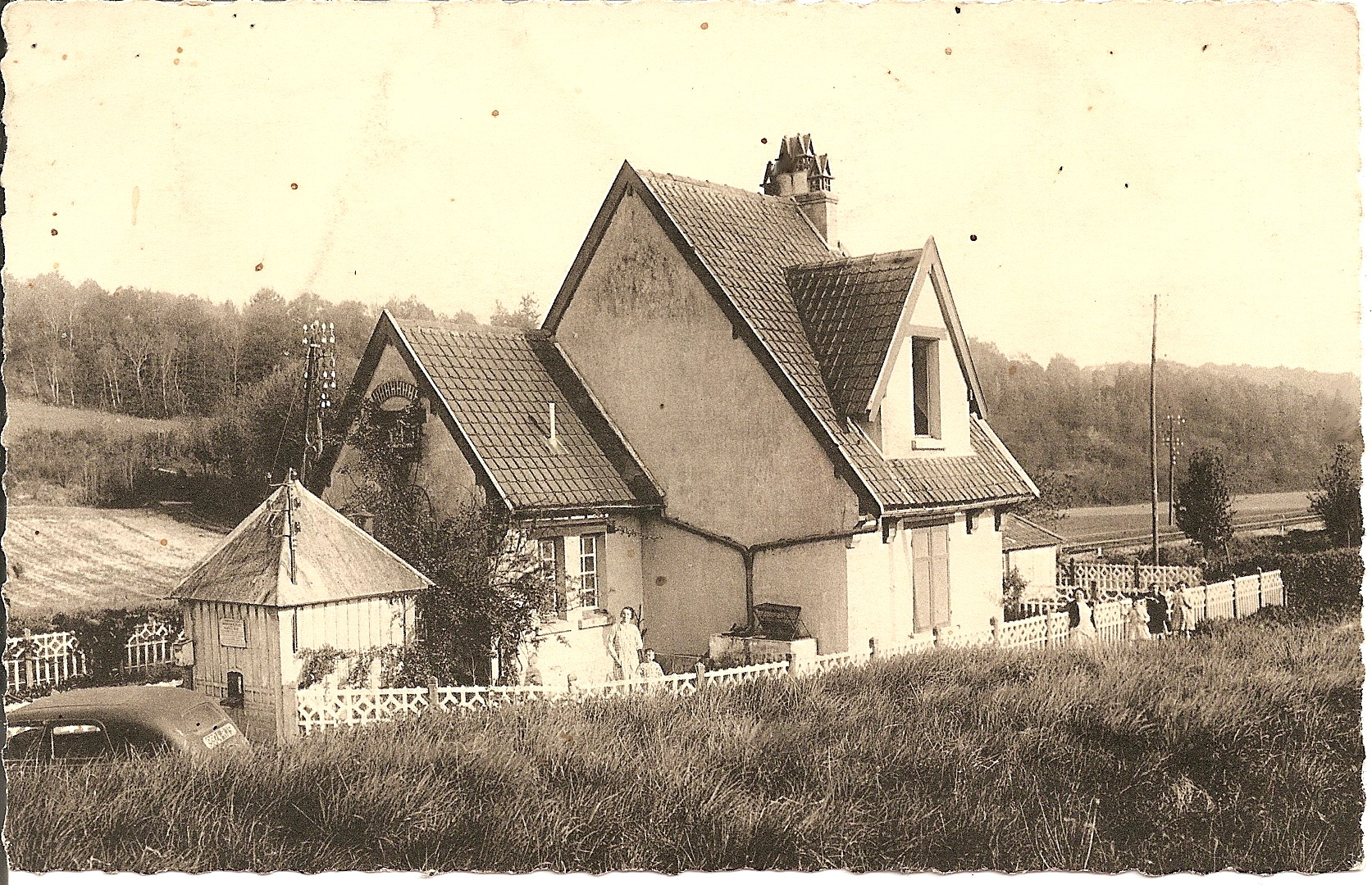 Carte postale ancienne éditée par Mme Léveillé, N°5104 Fontaine-Lavaganne : La Gare